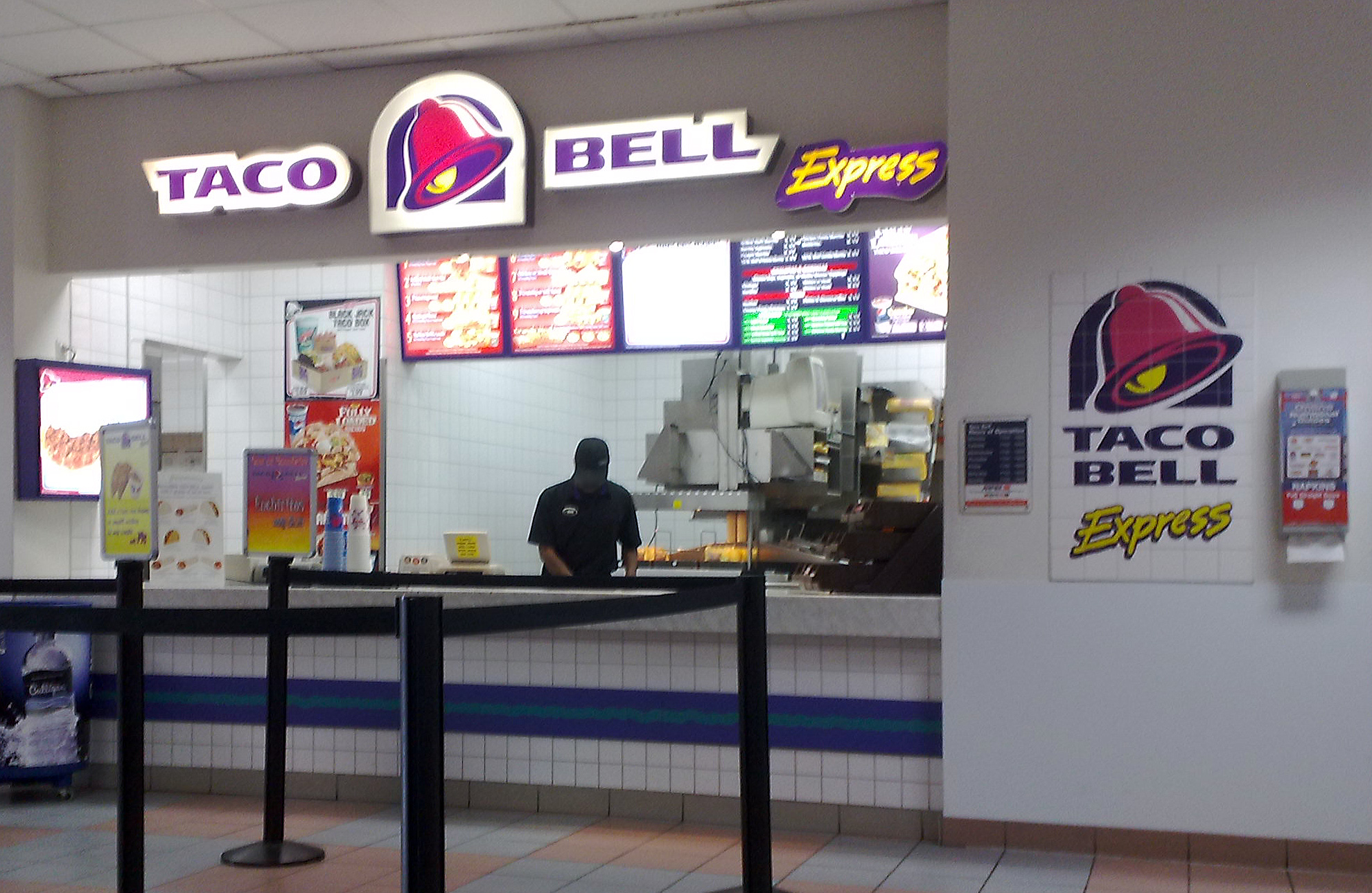 Taco Bell Express Restaurant in Mannheim, Benjamin Franklin Village (US Army Militärbasis)